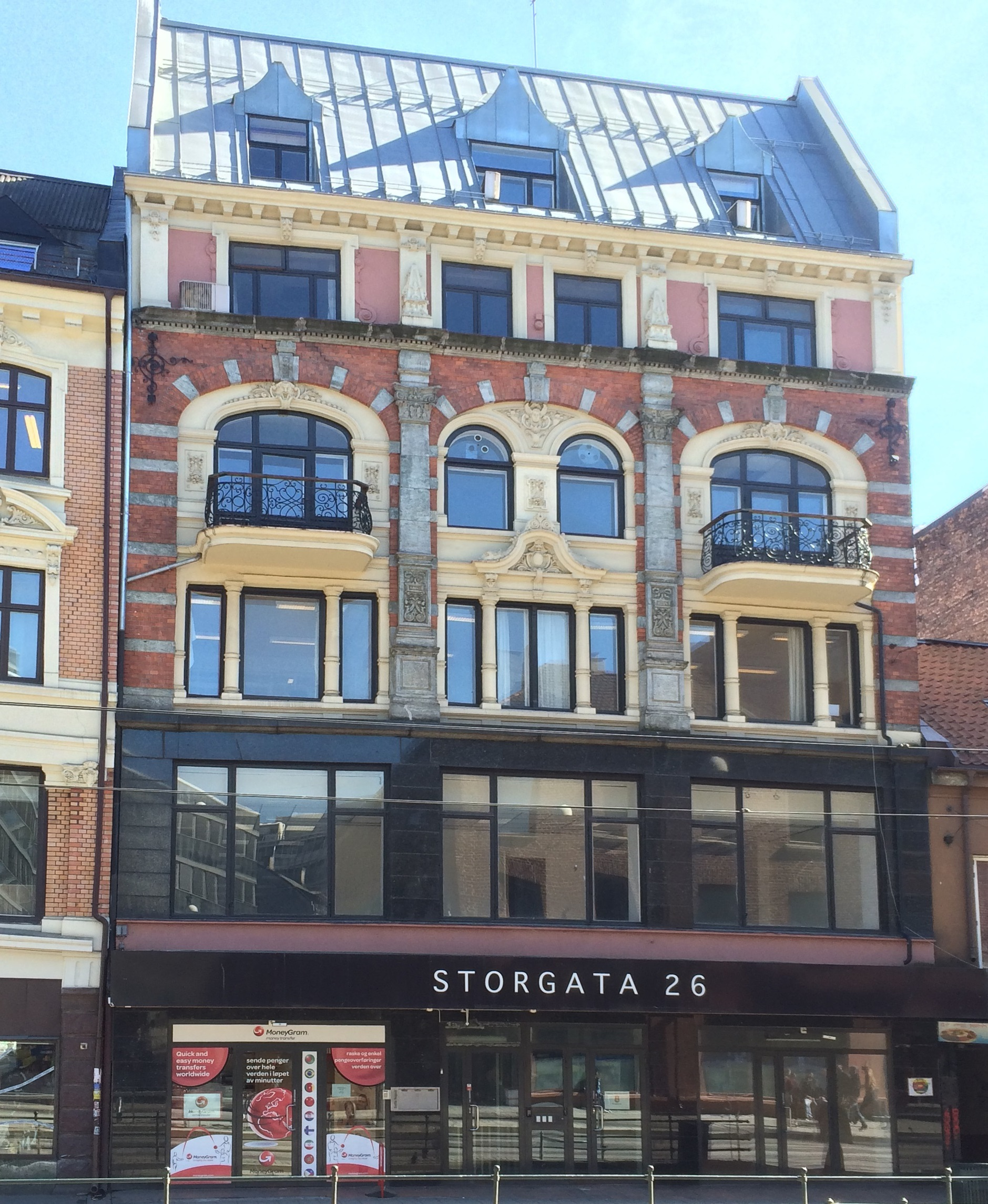 Storgata 26. Arkitekt: Ludwig Zapffe (1898–99).